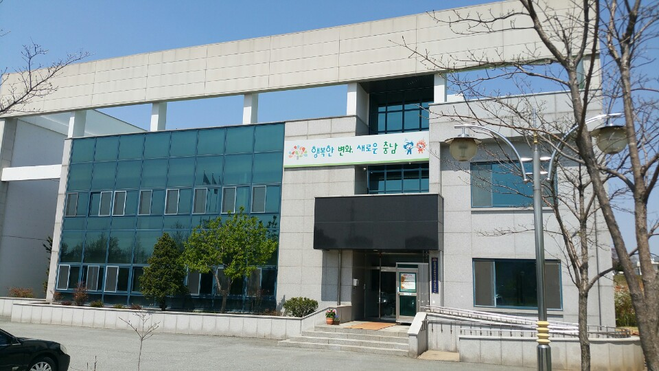 충청남도 동물위생시험소 공주지소